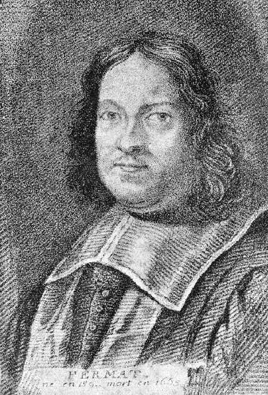 Gravure de Pierre de Fermat.